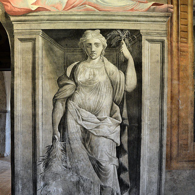 Affresco presso il Castello di Capua (CB) This is a photo of a monument which is part of cultural heritage of Italy.